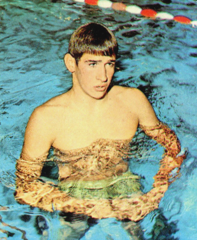 MUNCHEN 72 - Figurina-Stickers - Panini - N° 189 - WINDEATT -AUS-NUOTO